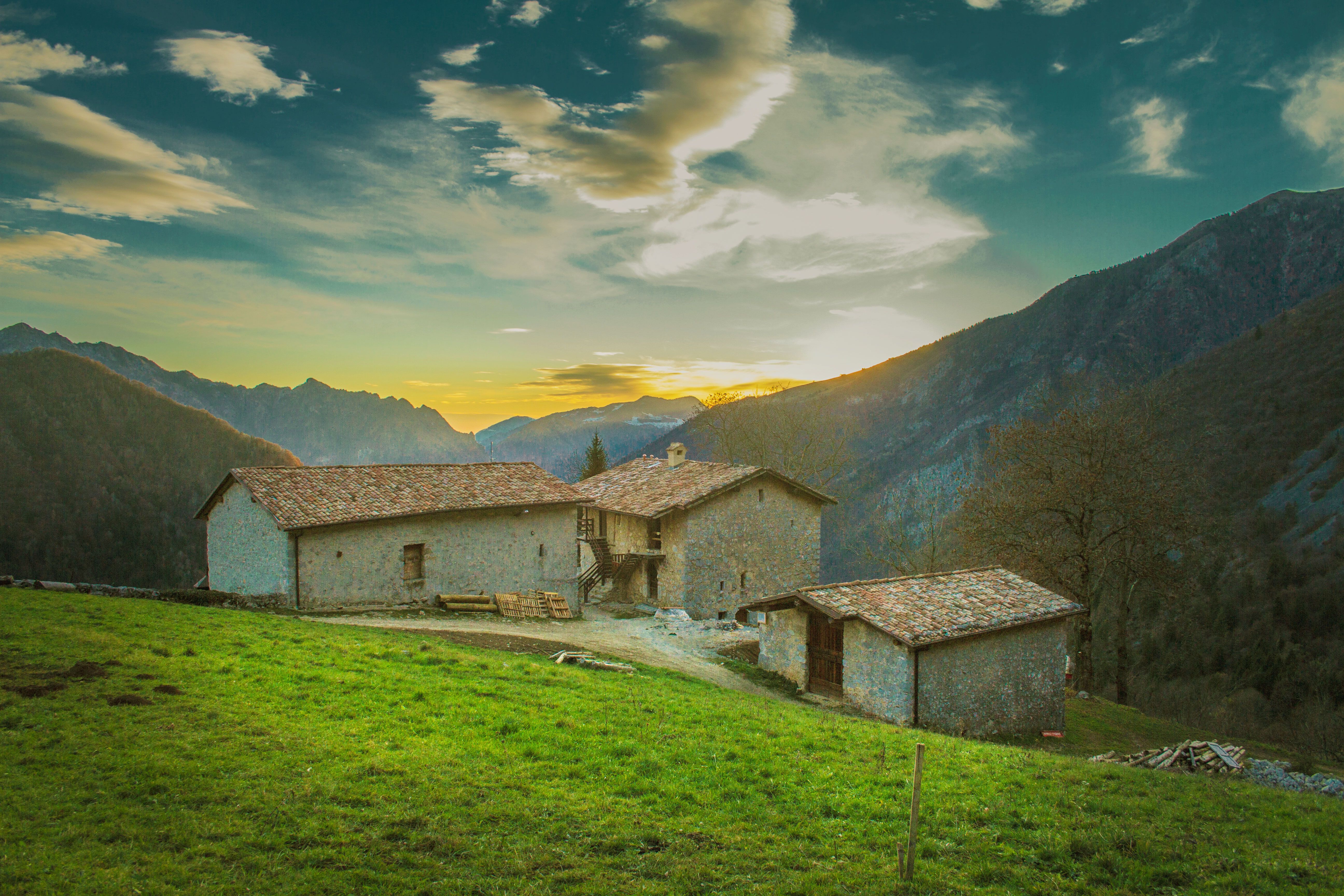 Contrada Bricconi Oltressenda Alta